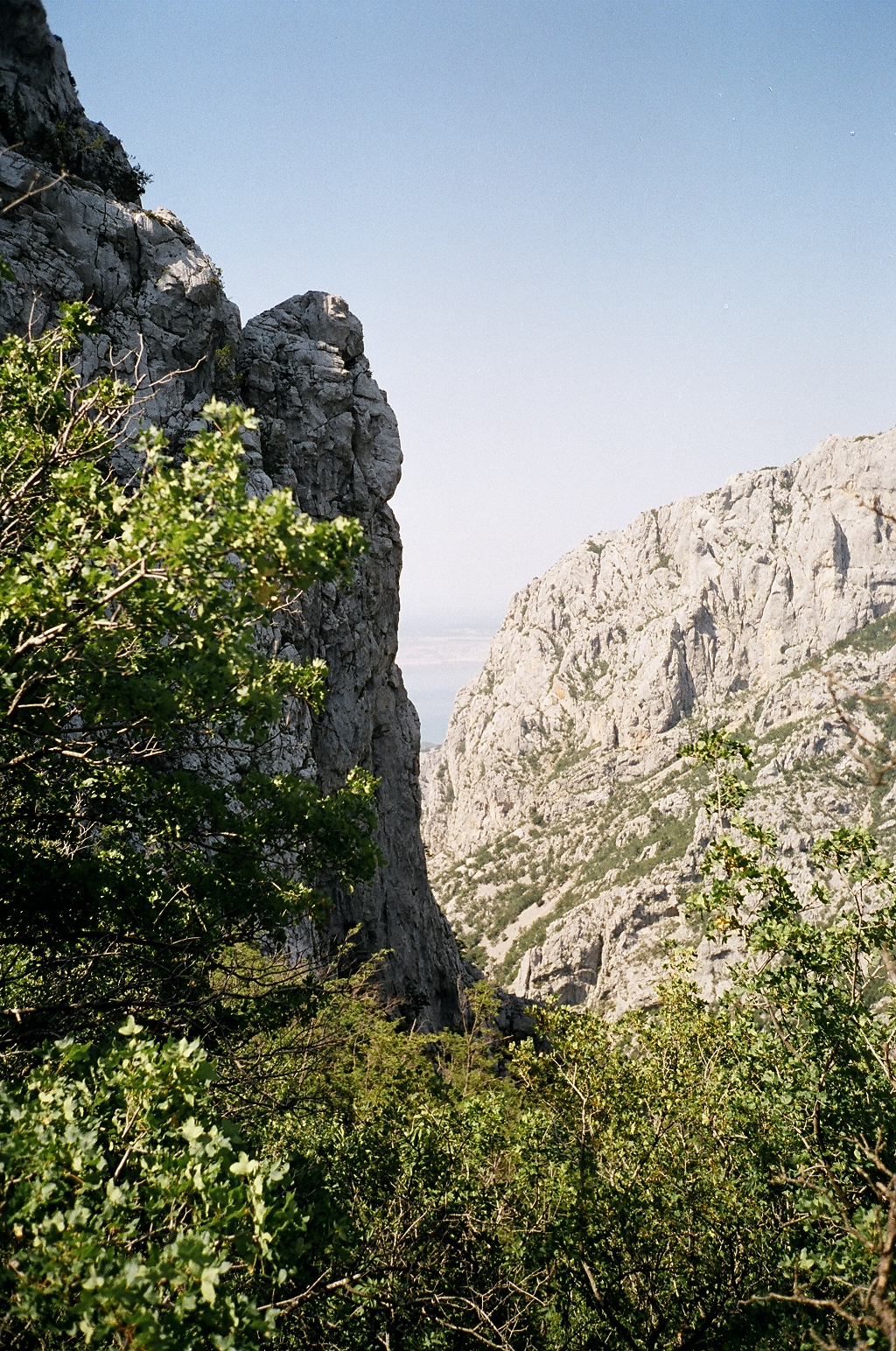 Velika Paklenica valley/Velika Paklenica upelio slėnis. Velebit, Paklenica national park